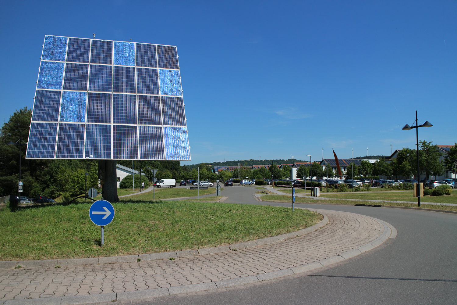 Solarpanel auf dem Campus-Gelände